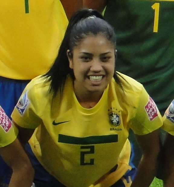 Time titular do jogo Brasil x Noruega, disputado em 03/07/2011, em Wolfsburg, Alemanha, na Volkswagen Arena, em partida válida pela Copa do Mundo Feminina de 2011, contra a Noruega.